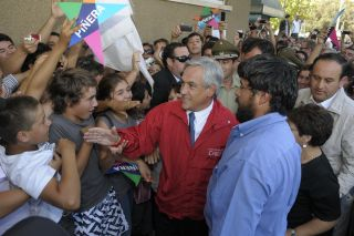 El presidente Sebastián Piñera de visita en Rancagua tras el terremoto de Pichilemu de 2010.